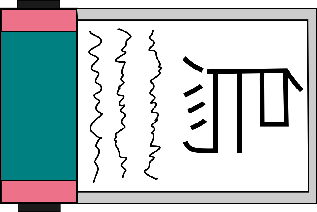 Parchemin_d'invocation_kankuro_karasu